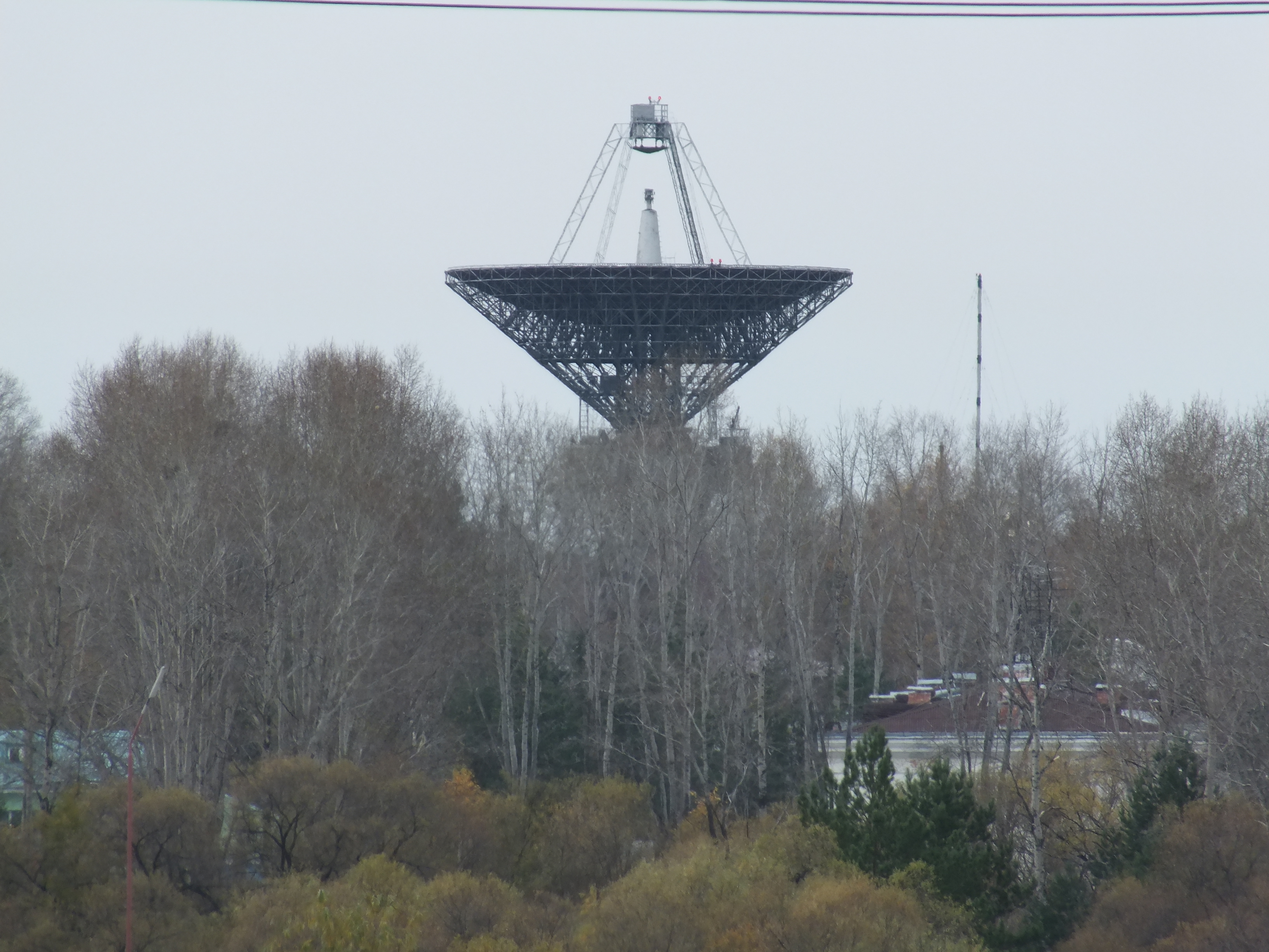 Село Восточное Хабаровский край 2016